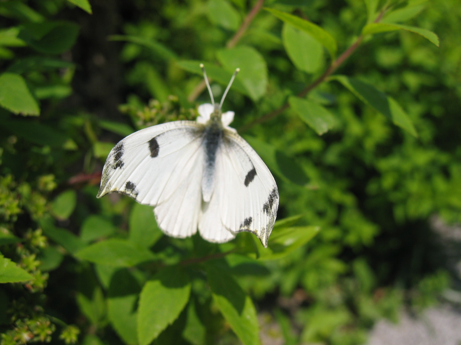 Anthocharis scolymus (Butler, 1866) (Lepidoptera, Pieridae)2006年4月30日、神奈川県愛甲郡清川村にて利用者自身の撮影。 多少ピンぼけしてますがツマキチョウの♀です。